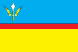 Прапор Ясинуватського району